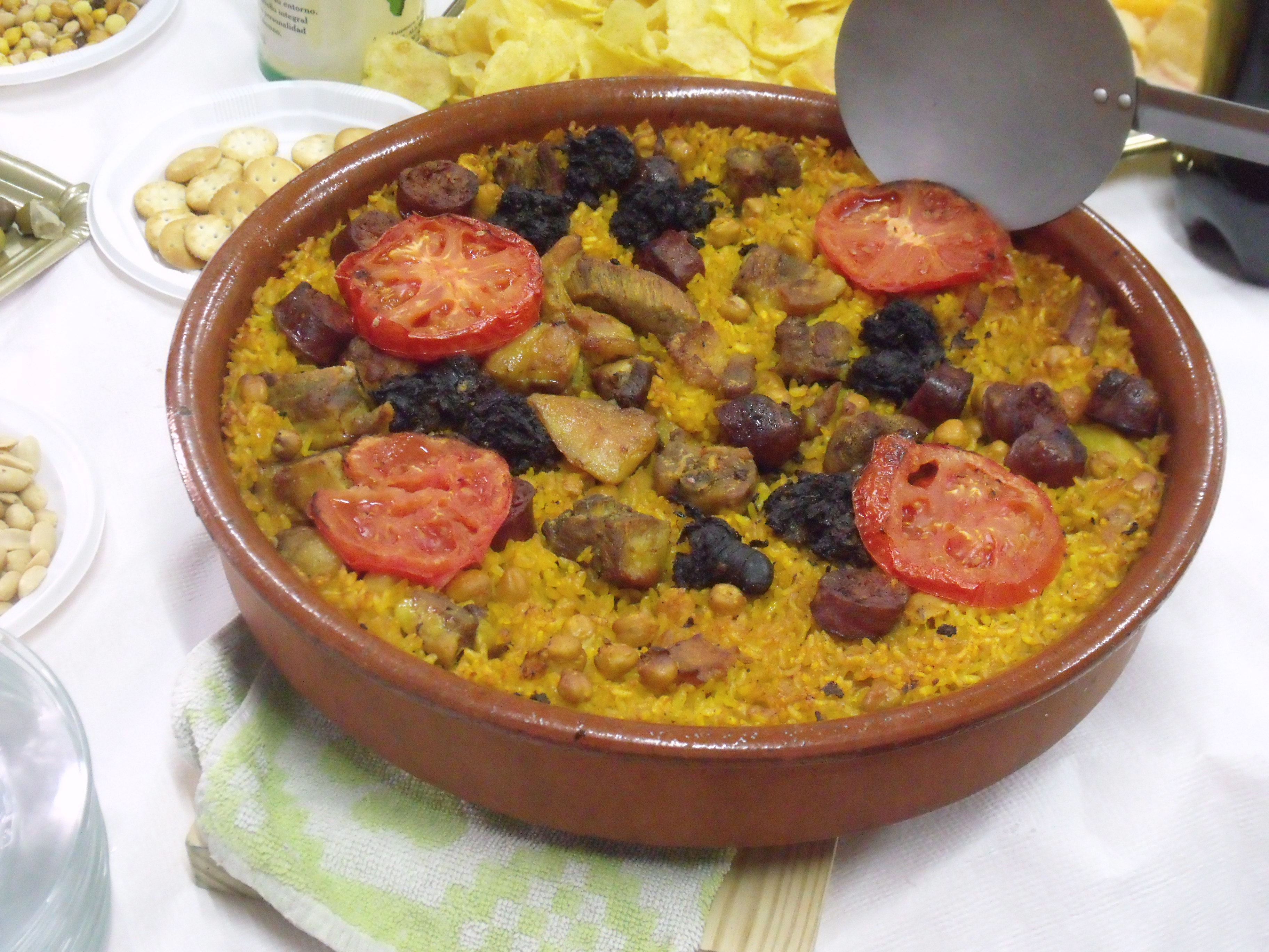 Plato de arroz cocinado al horno